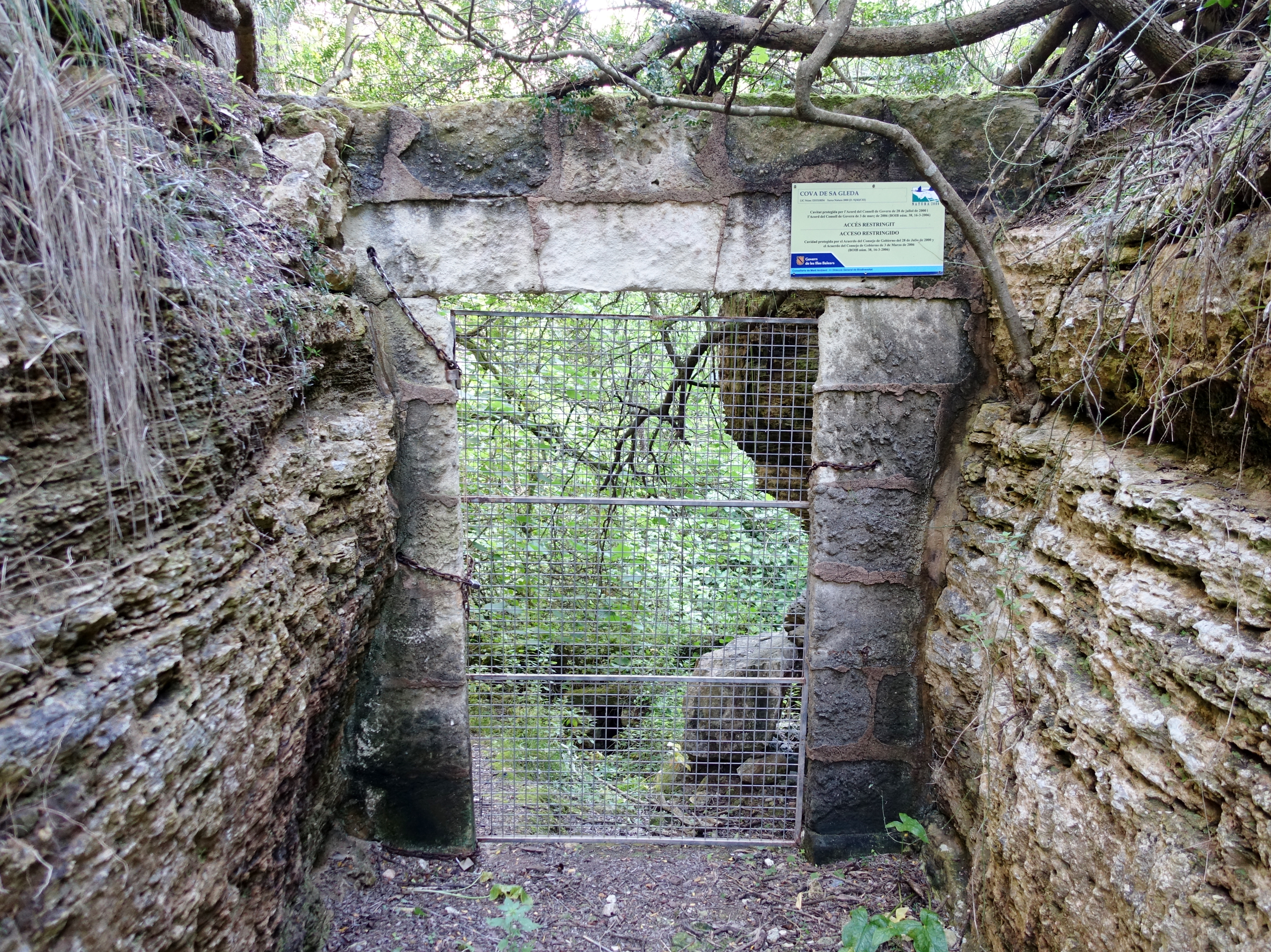 Eingang zur Cova de sa Gleda, Gemeinde Manacor, Mallorca, Spanien